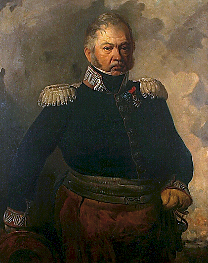 General Józef Dwernicki